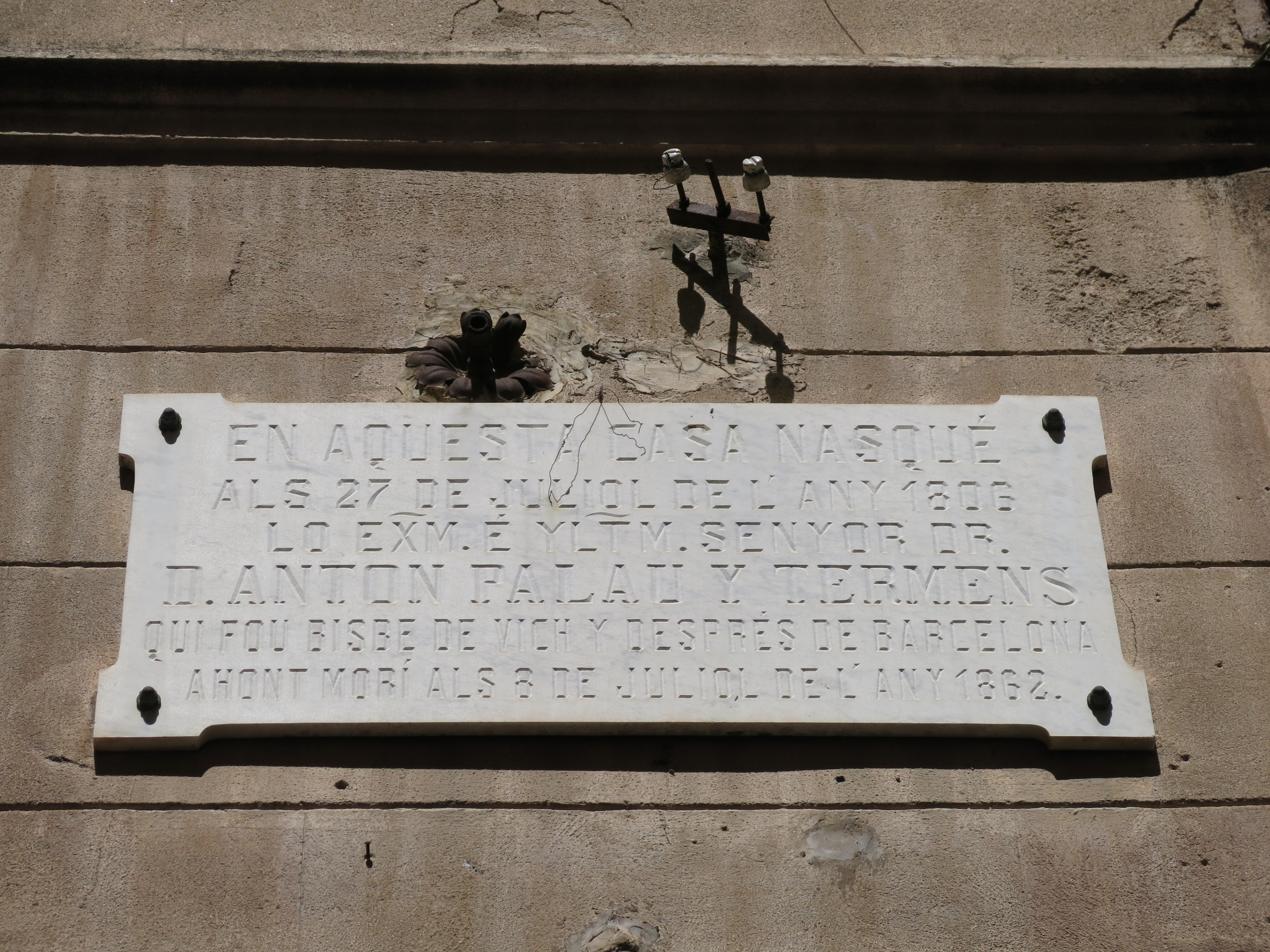 Casa al carrer Sant Antoni, 53 (Valls)